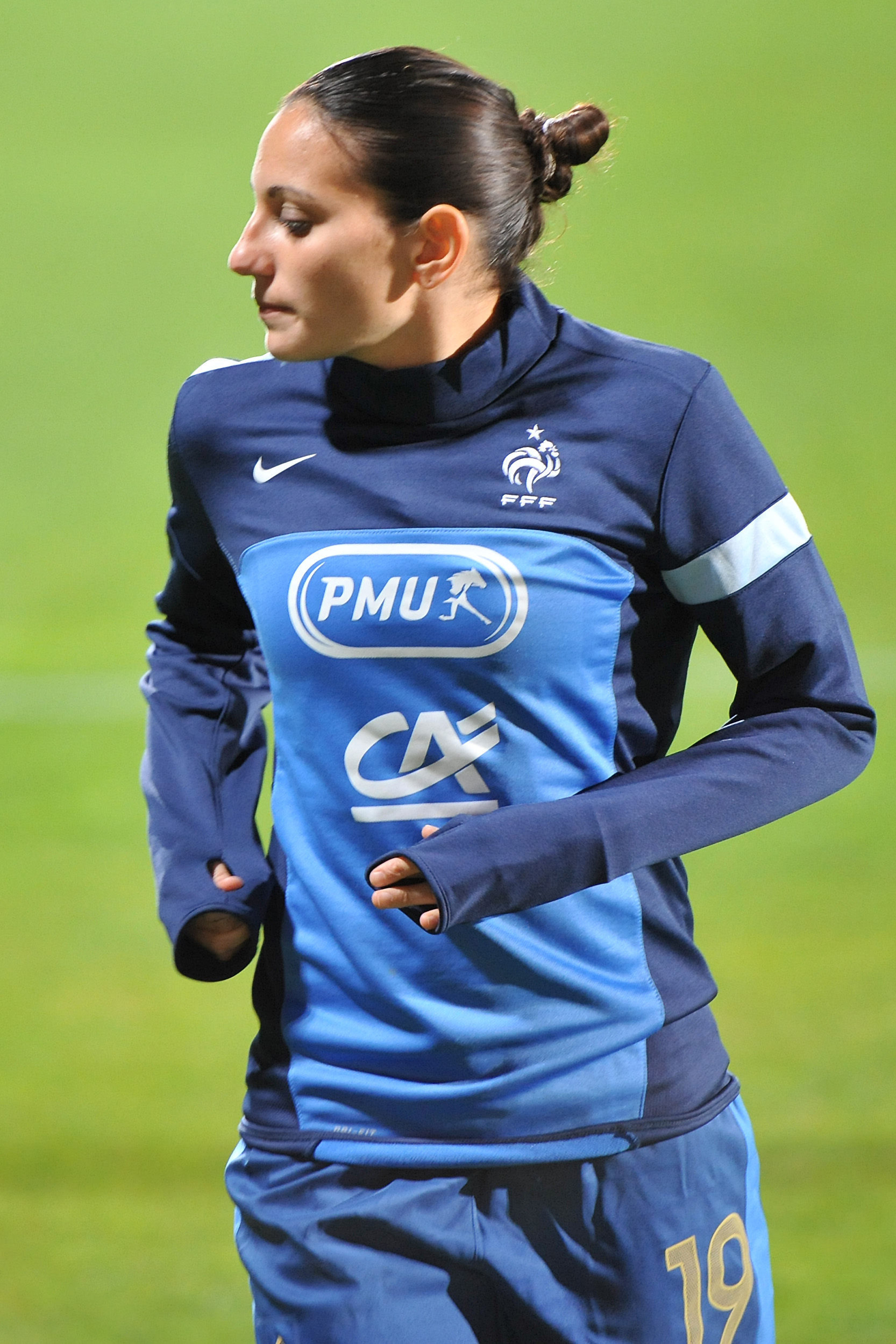 FIFA Women's World Cup 2015 Qualiying Round Österreich - Frankreich am 31. Oktober 2013 in Ritzing: Aurélie Kaci